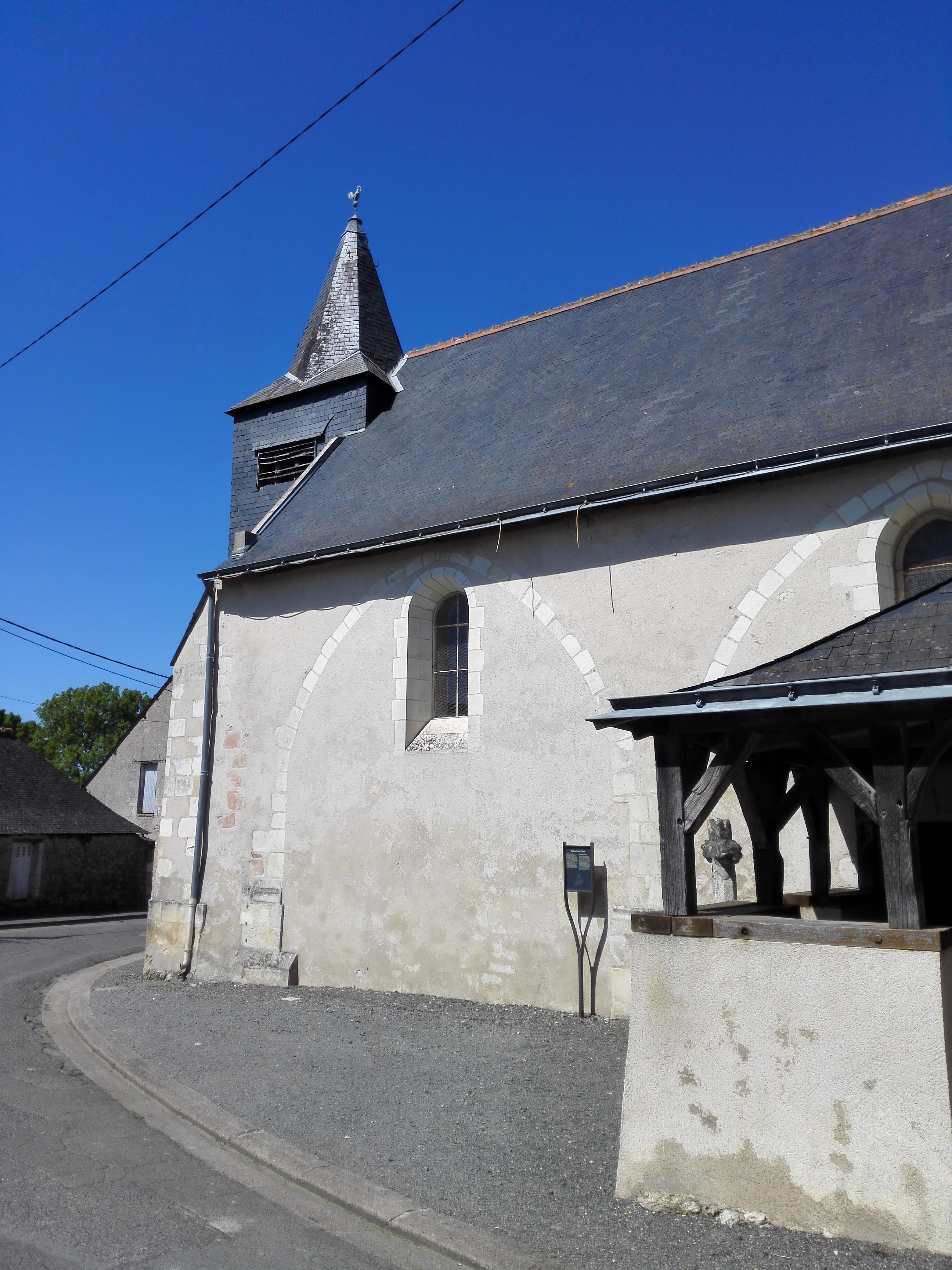 Église paroissiale Saint-Pierre de Druye (Indre-et-Loire, France)